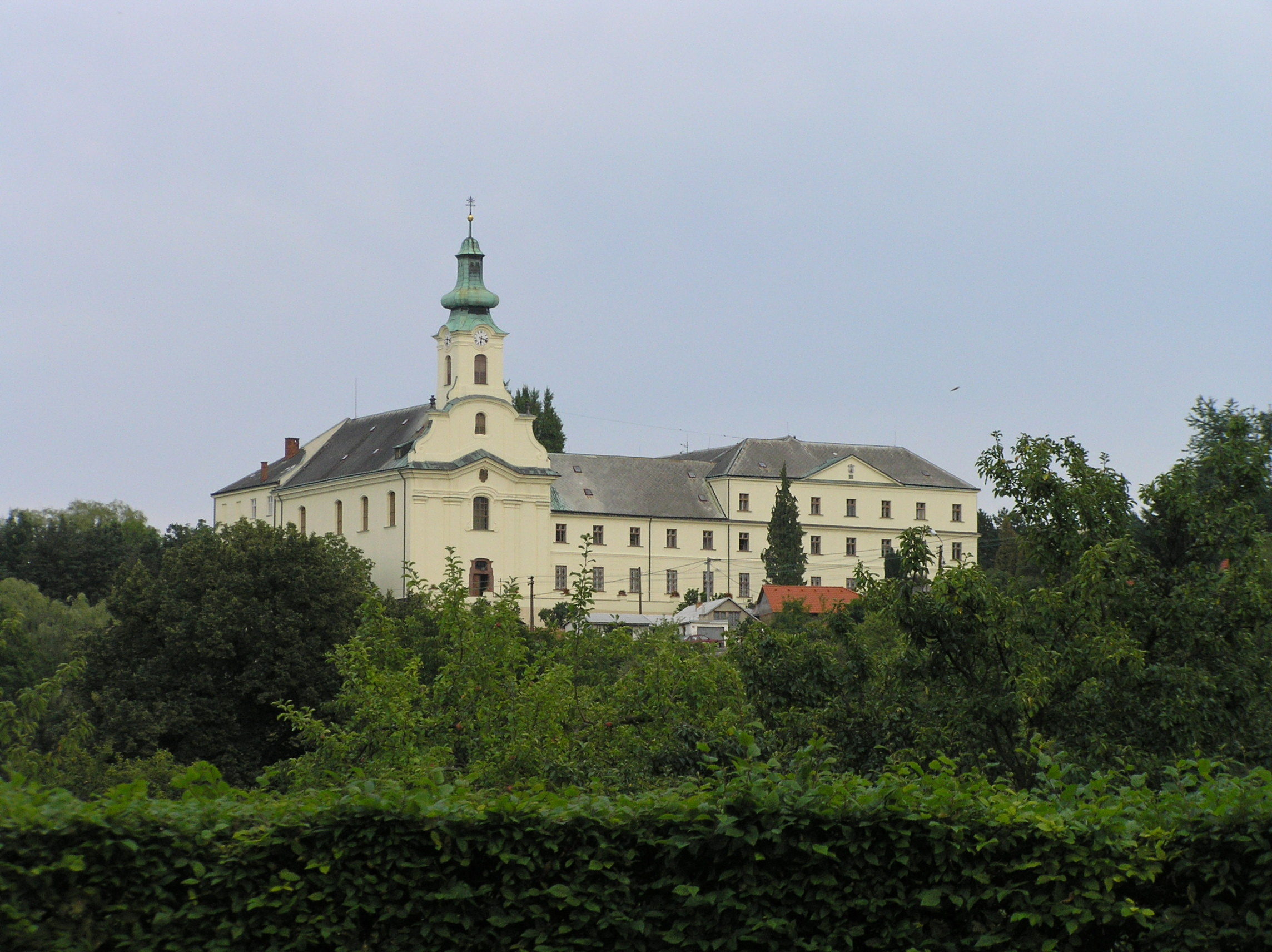 Klášter Milosrdných bratří v Letovicích